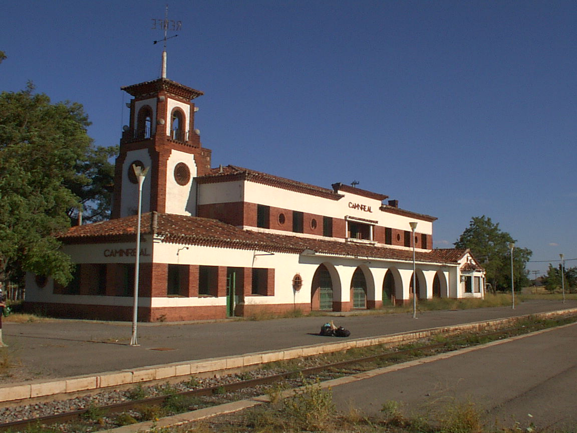 Estacion de Caminreal (Teruel - Spain).